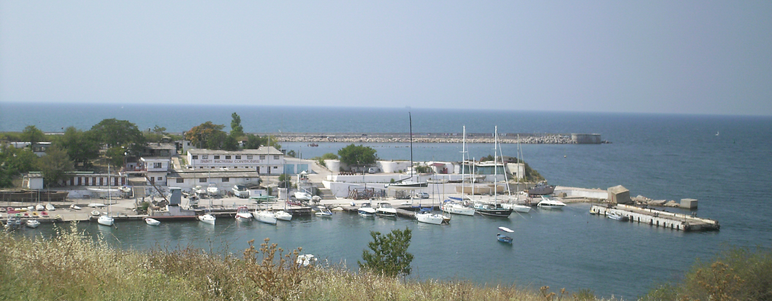 Александровская бухта в Севастополе